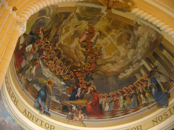 Pisano Etneo (CT) -Transito di S. Giuseppe, affresco di Rosario Scavo - Chiesa "S. Giuseppe" - Foto D. Pennisi